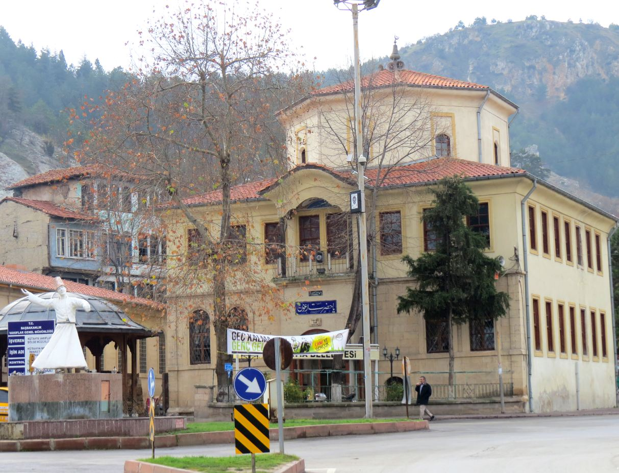 Kütahya Mevlevihanesi